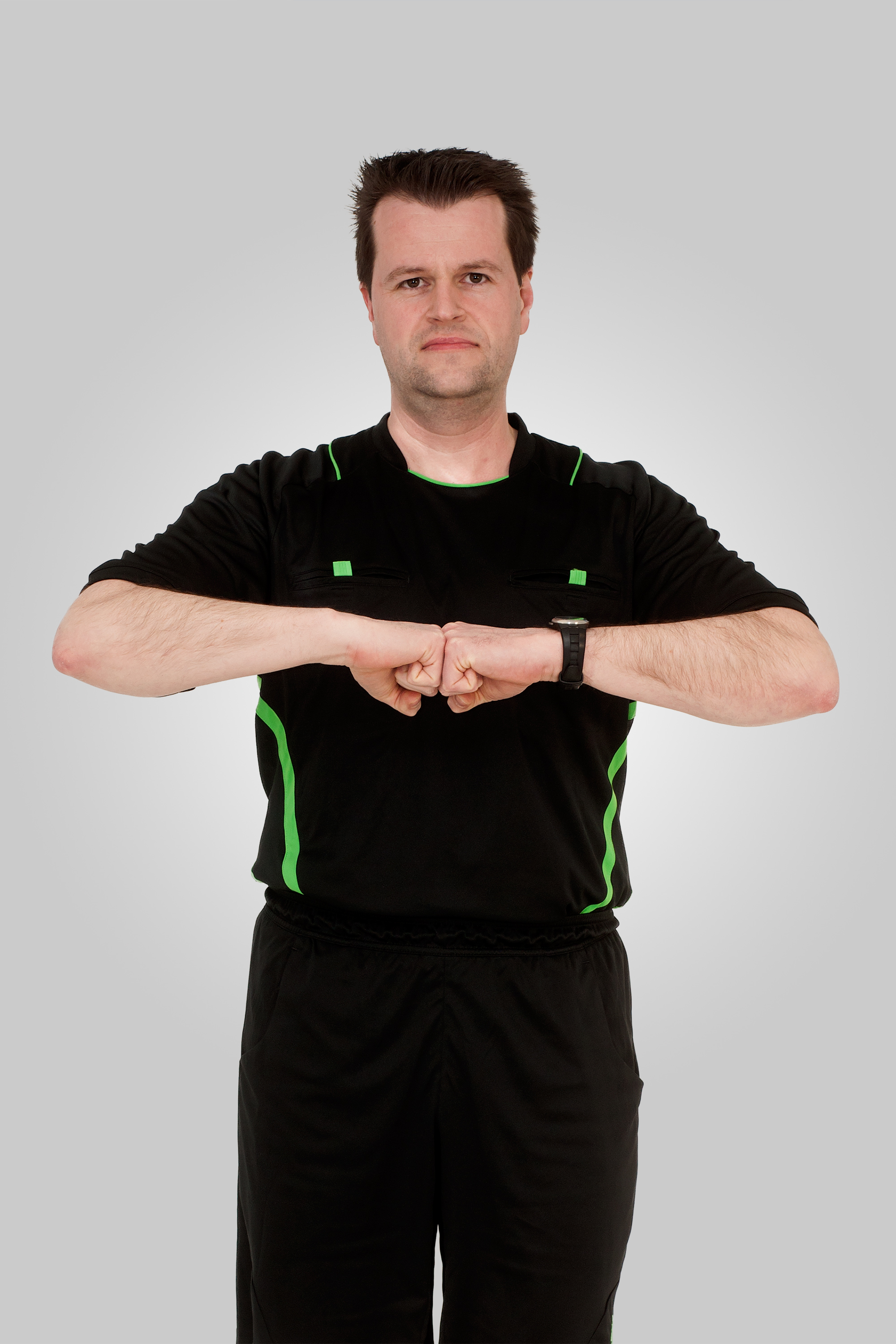 Internationale Handballregeln Handzeichen 04 Umklammern, Festhalten oder Stoßen